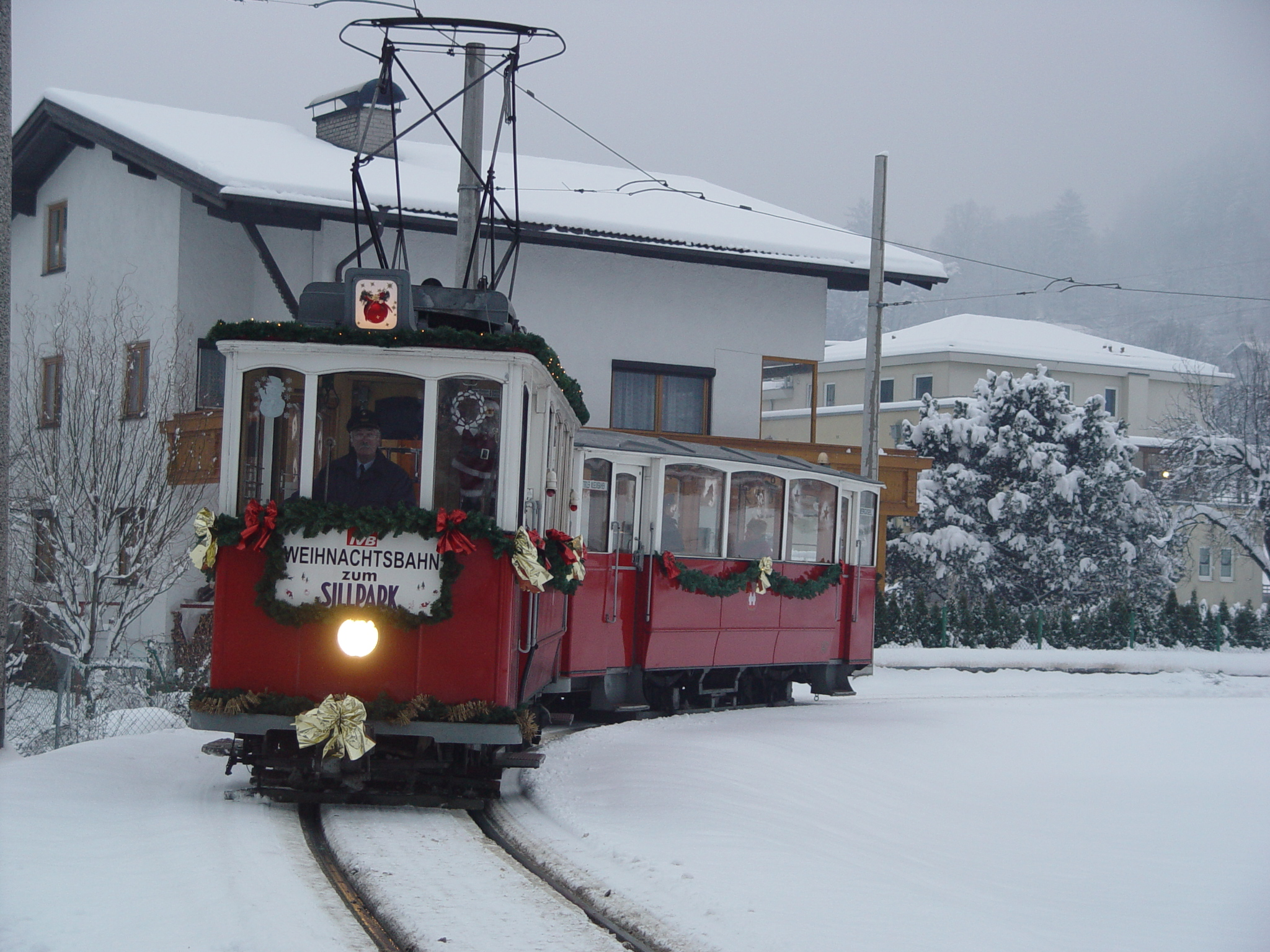 Triebwagen 19 und Beiwagen 147 der Tiroler Museumsbahnen bei einer Sonderfahrt als Weihnachtsbahn